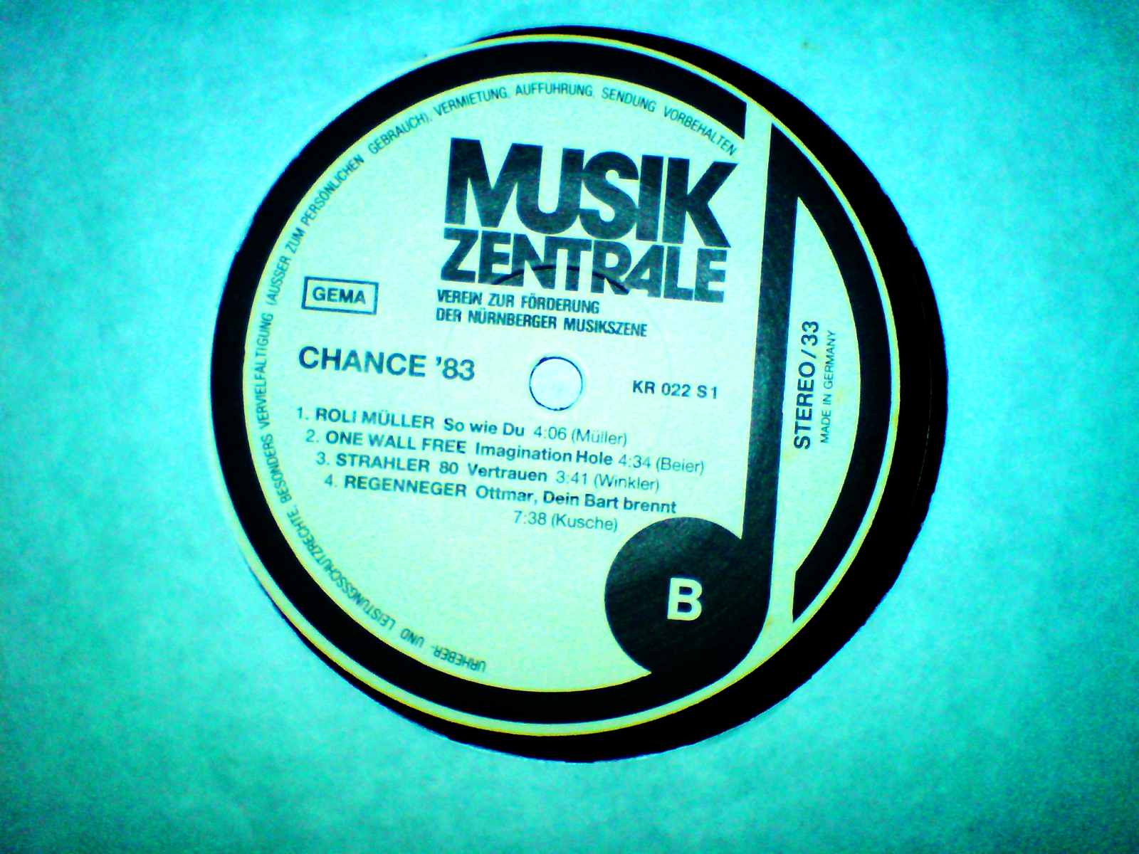 Pre MUZ Record Label 1983